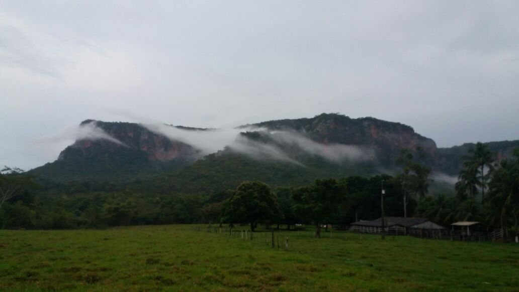 Distrito de Camisão